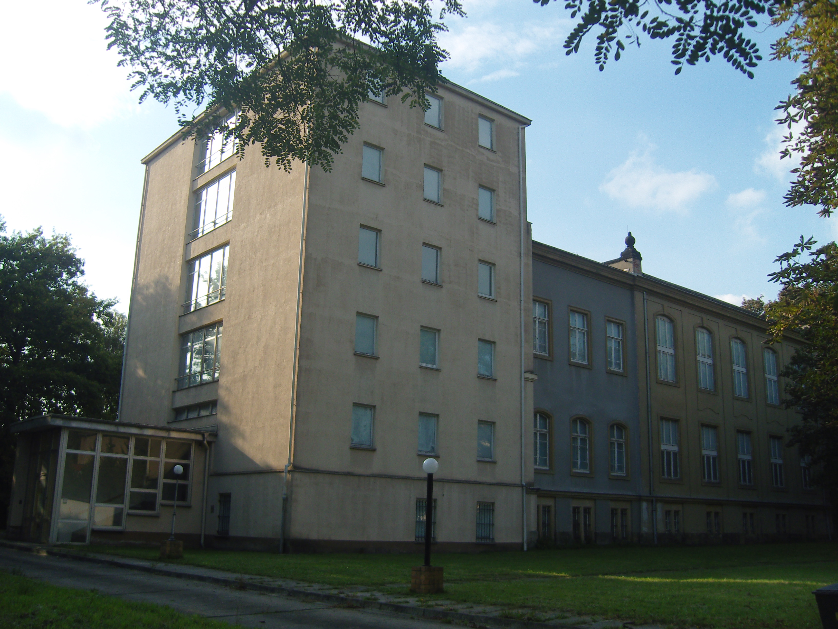 Gebäude in der Marienallee 3 in Dresden, in der Albertstadt; denkmalgeschützt ist der Magazintrakt